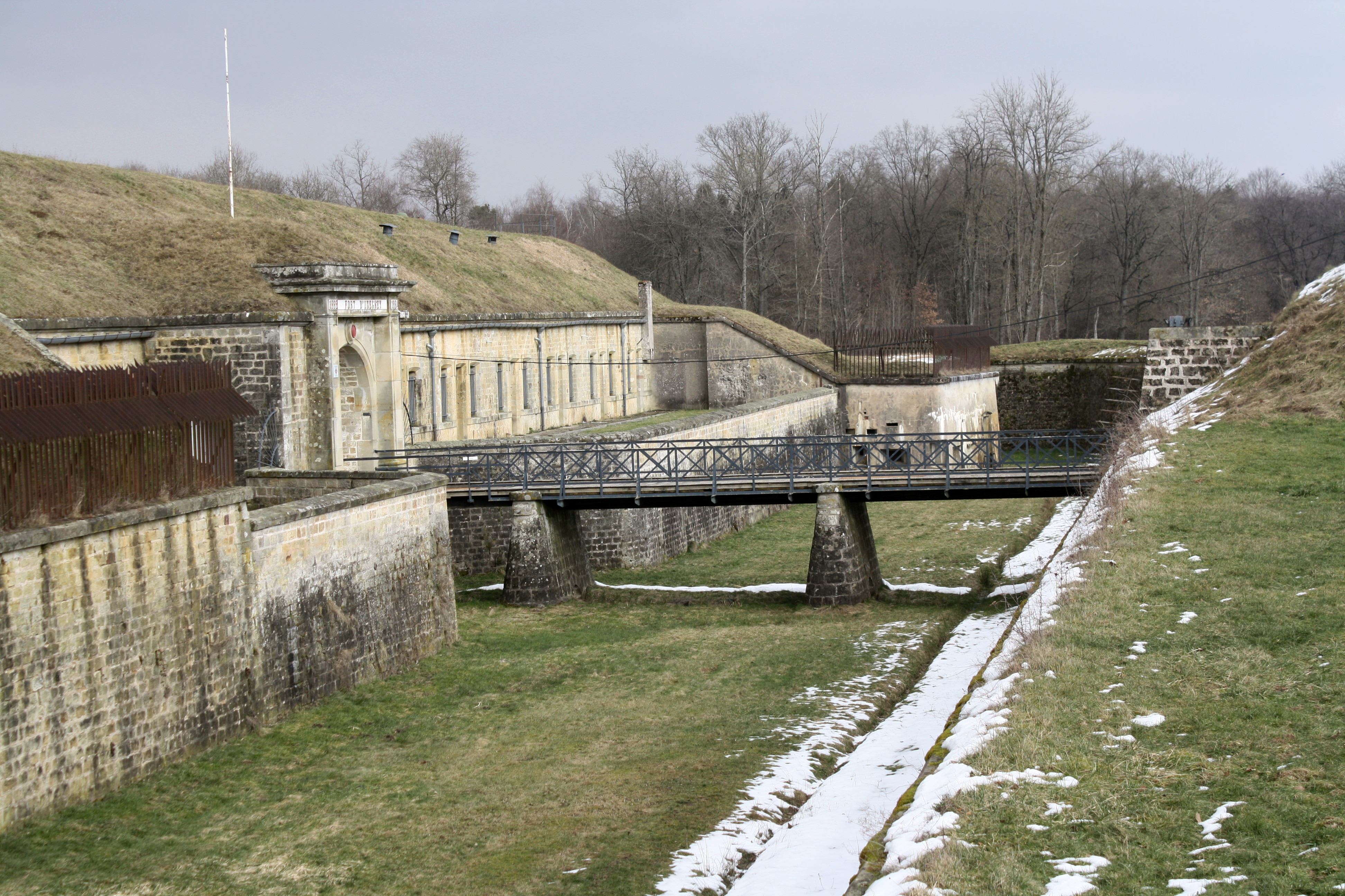 Le fossé de gorge du fort d'Uxegney